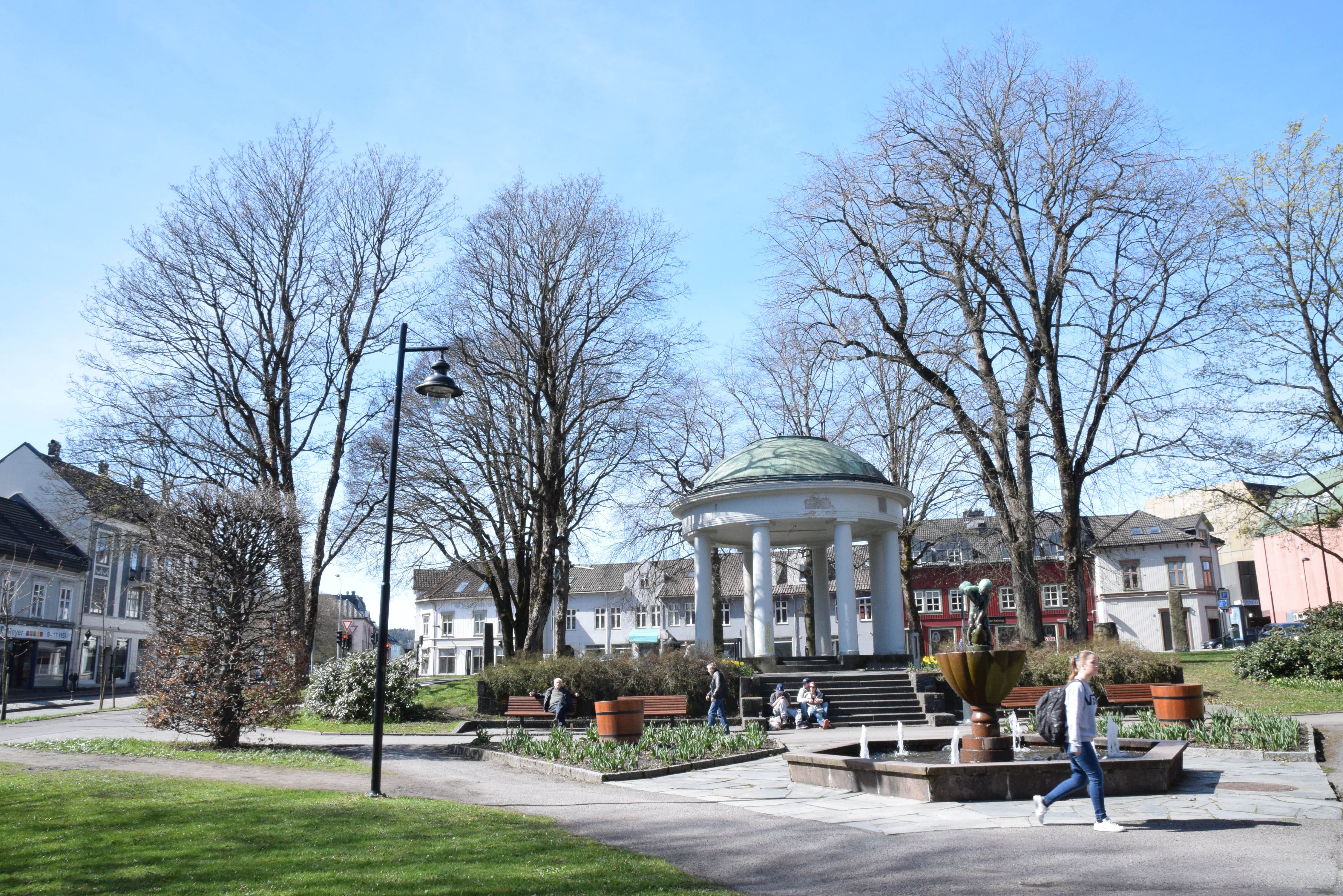 Stoltenbergparken med fontenen